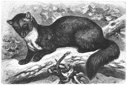 Edelmarter (Mustela martes). Currently: Martes martes